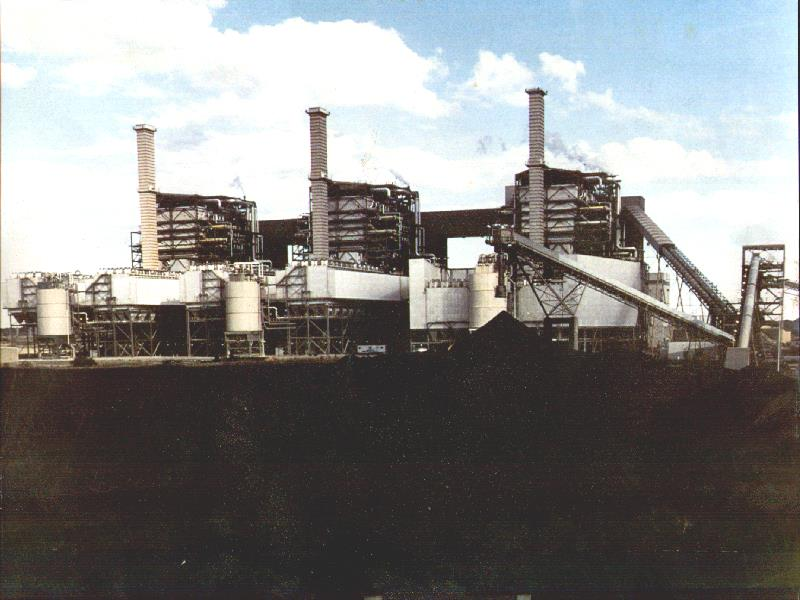 J. Robert Welsh Power Plant